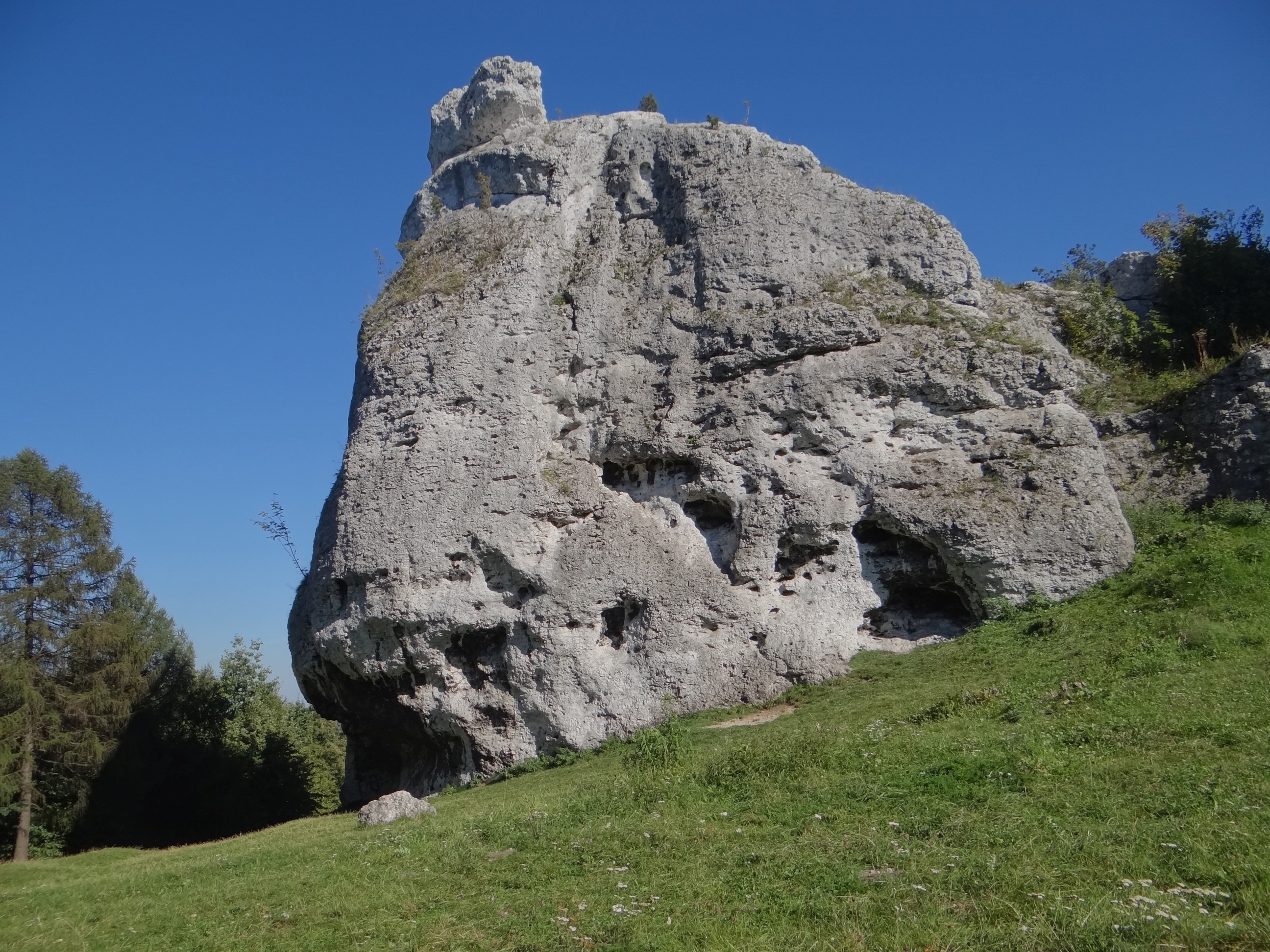 Skała Adept w Podzamczu